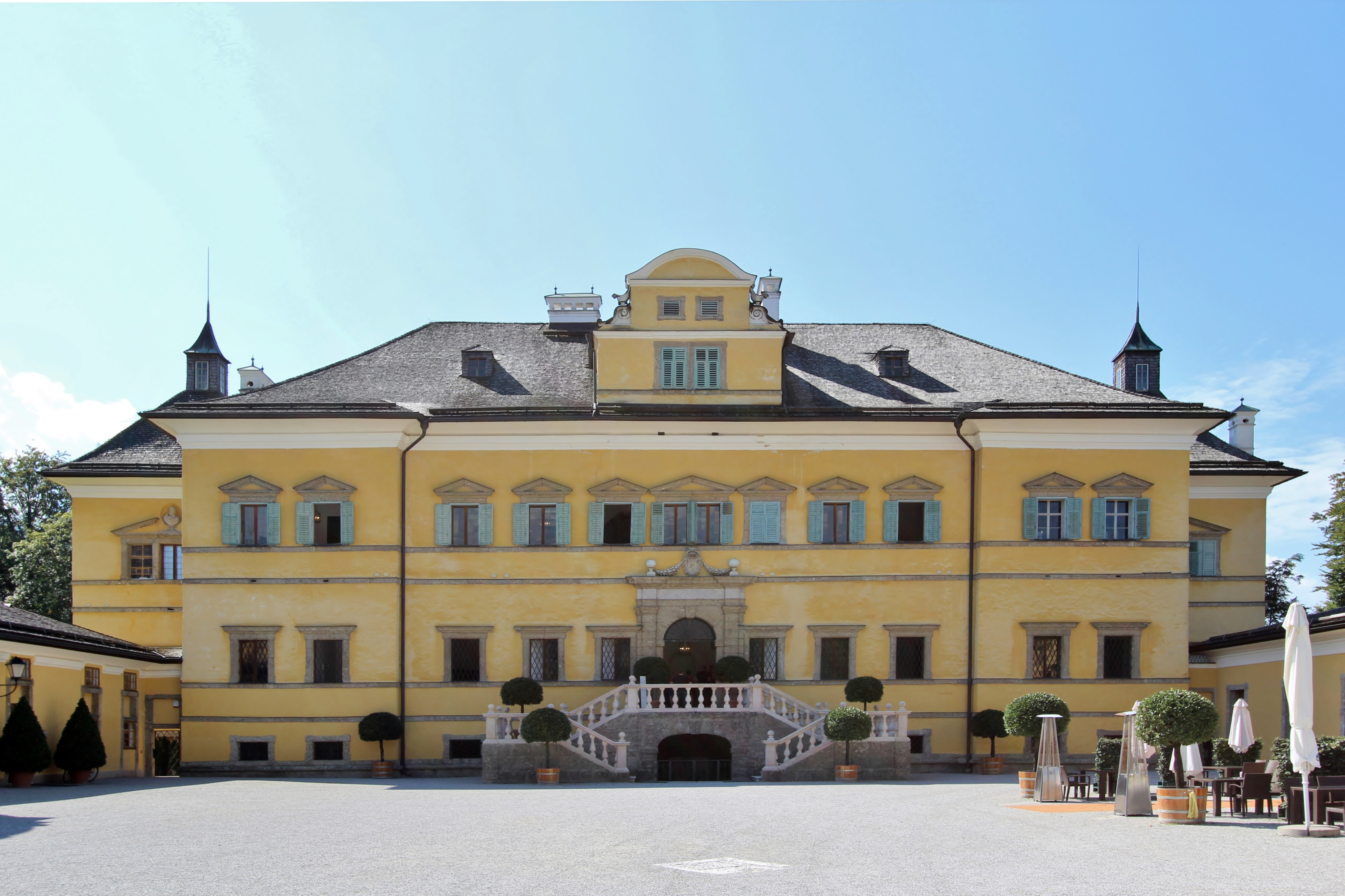 Die Fassade des Lustschlosses Hellbrunn im Jahr 2014